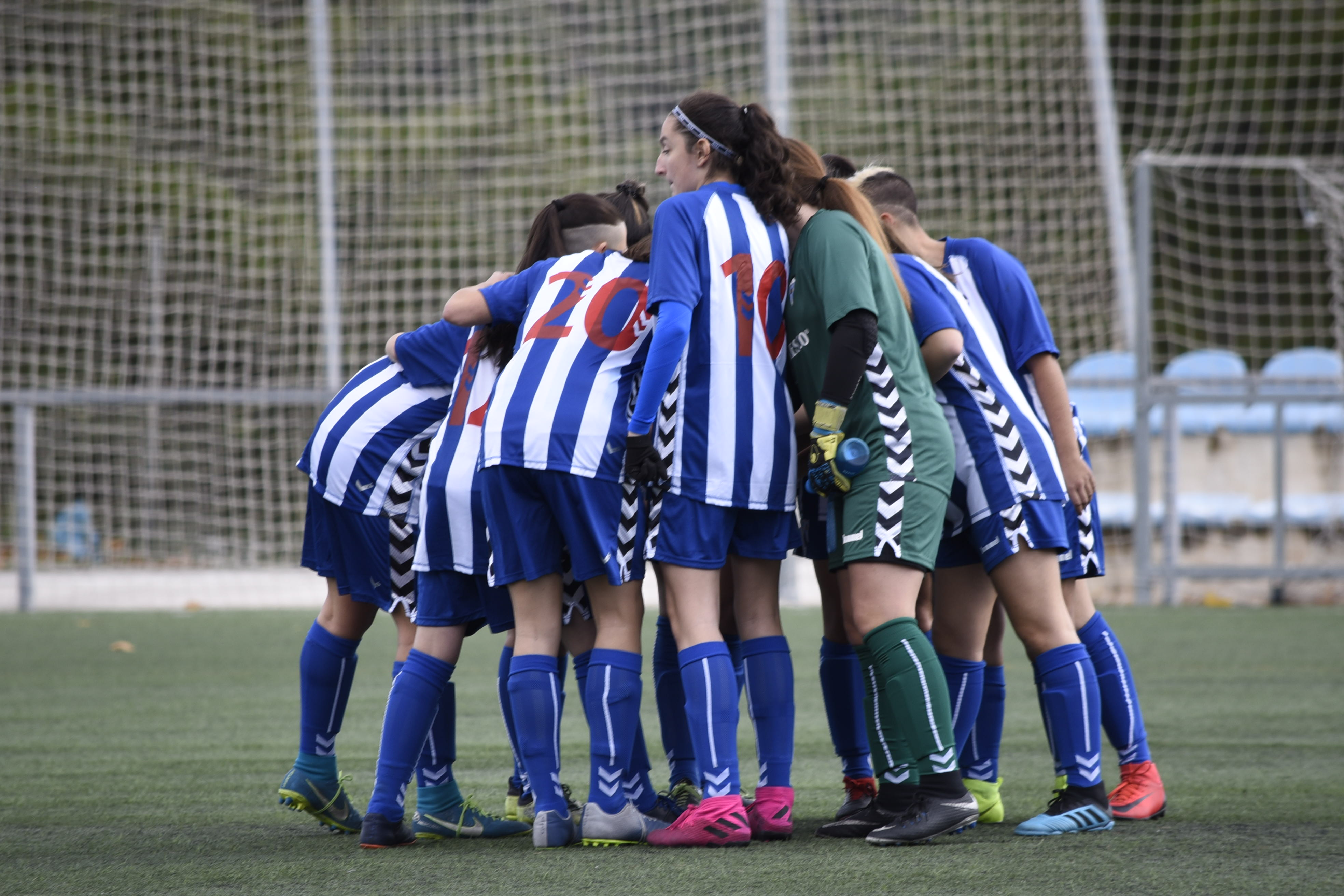 Les jugadores del CD Alcoyano Femeni fent pinya